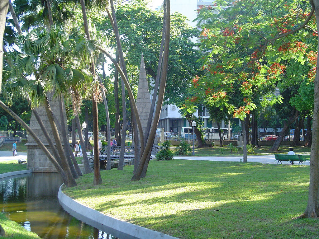 Passeio Público, Rio de Janeiro, Brazil